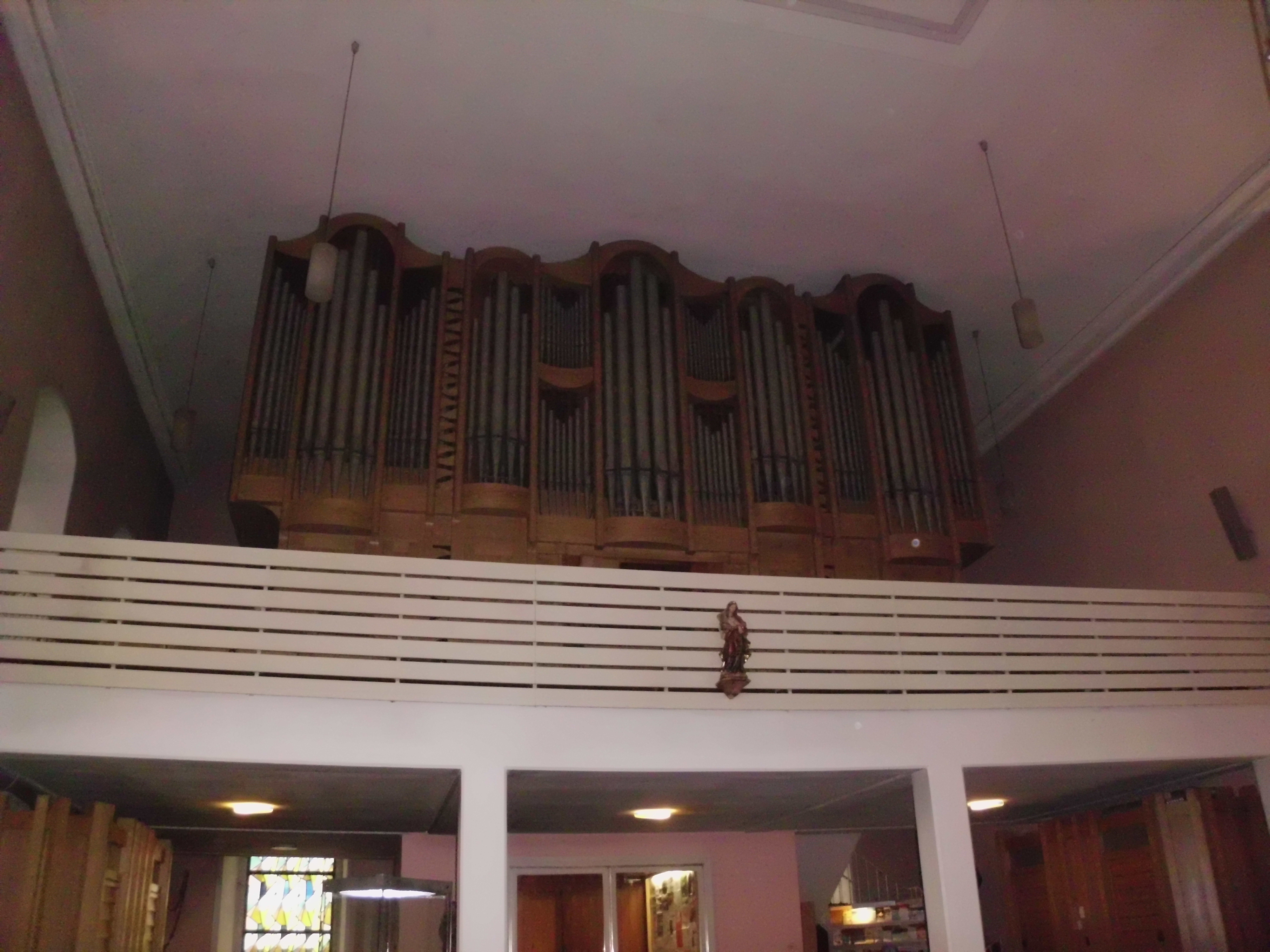 Die Orgel